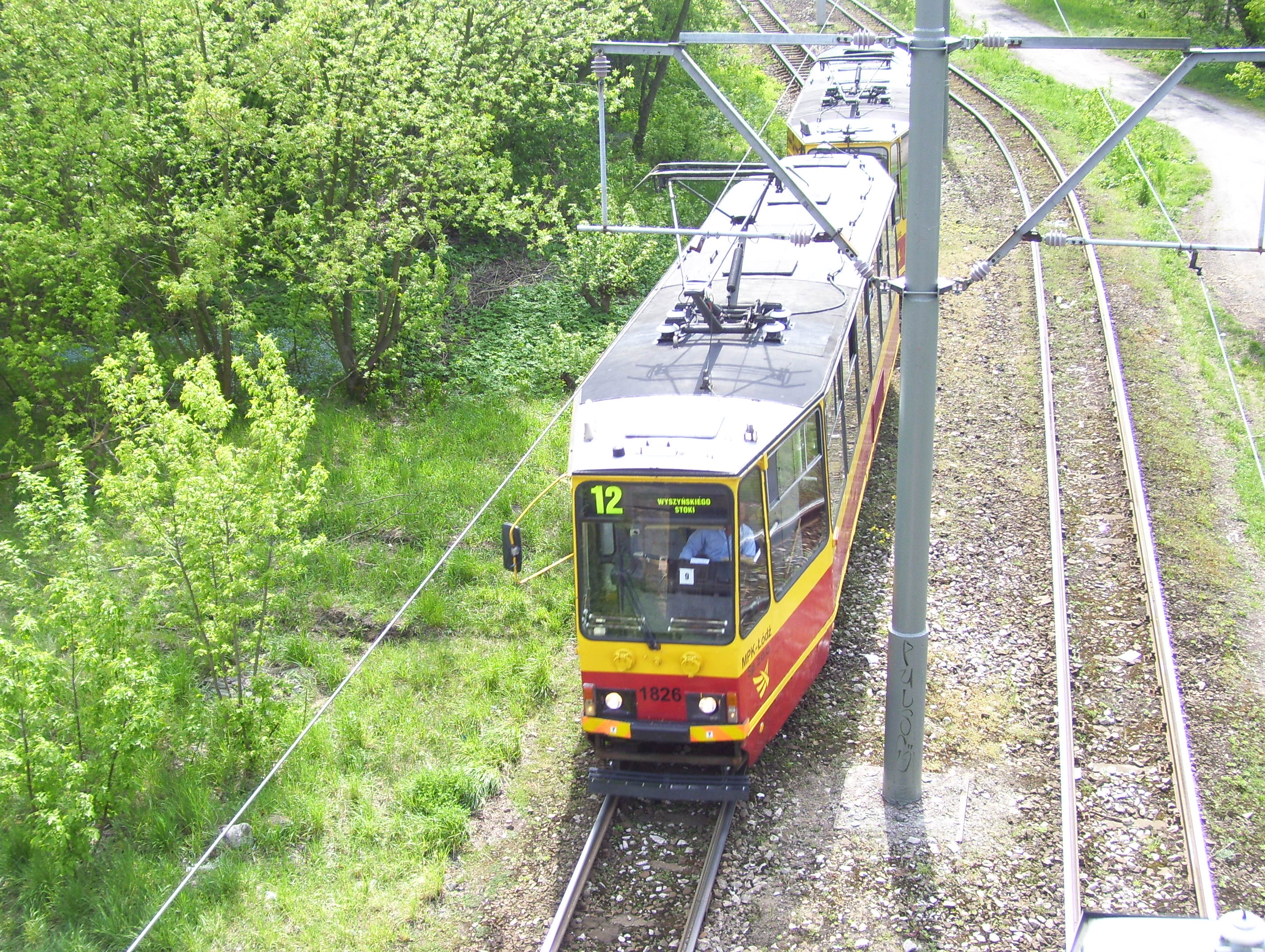 Tramvaj v Lodži, Polsko